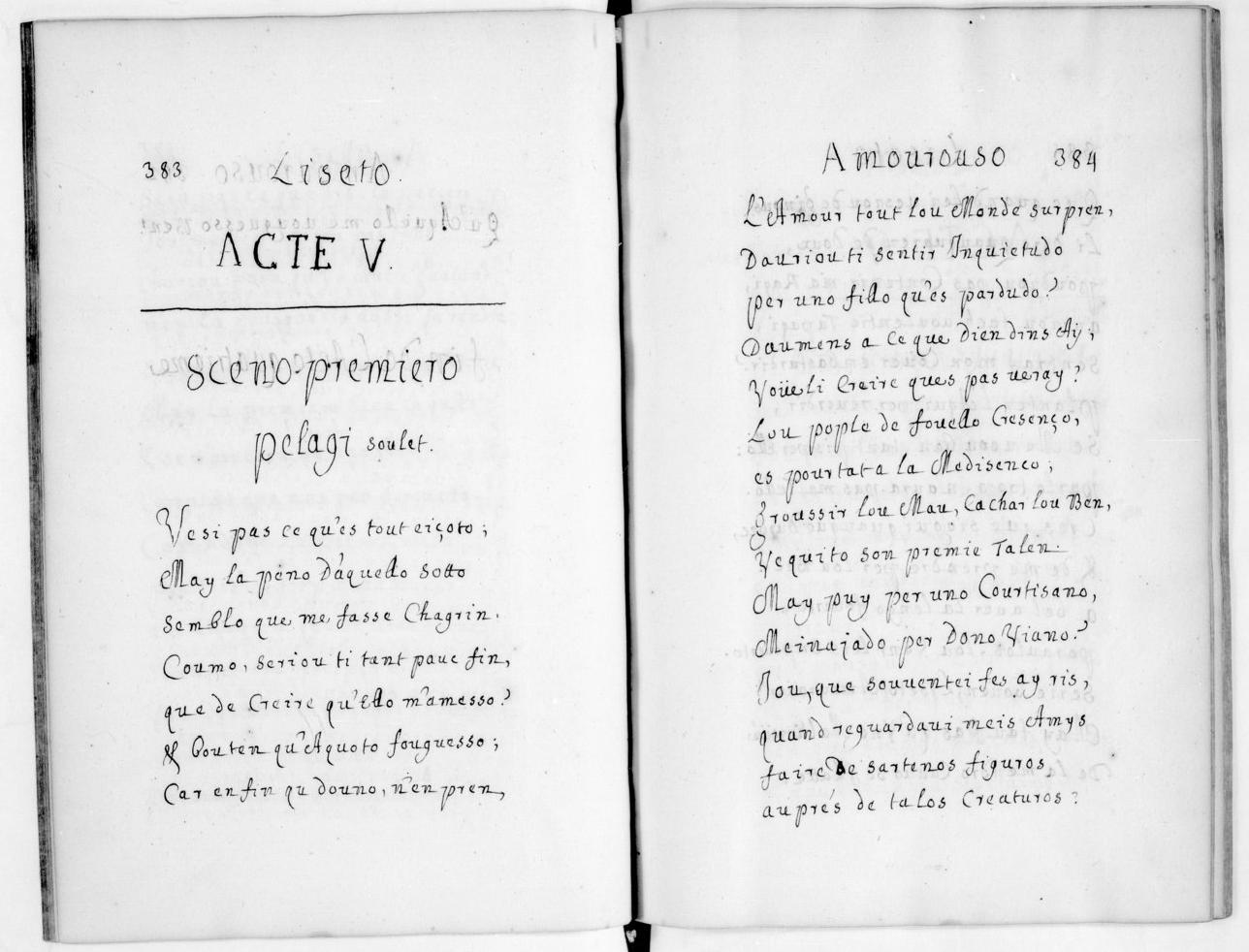 manuscrit de EJan de Cabannes, ecrivain occitan